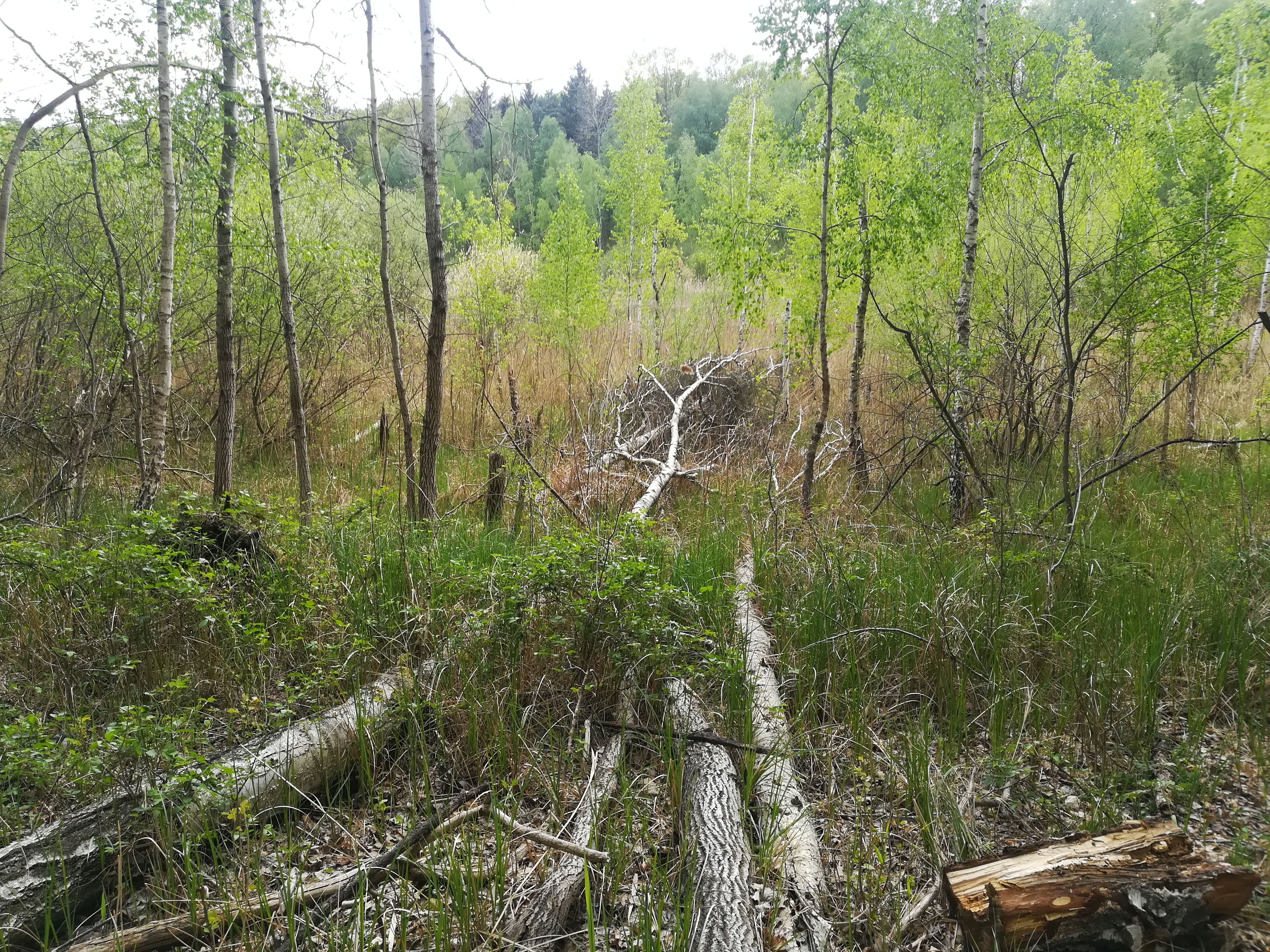 Wielkopolski Park Narodowy - Obszar Ochrony Ścisłej Jezioro Skrzynka.